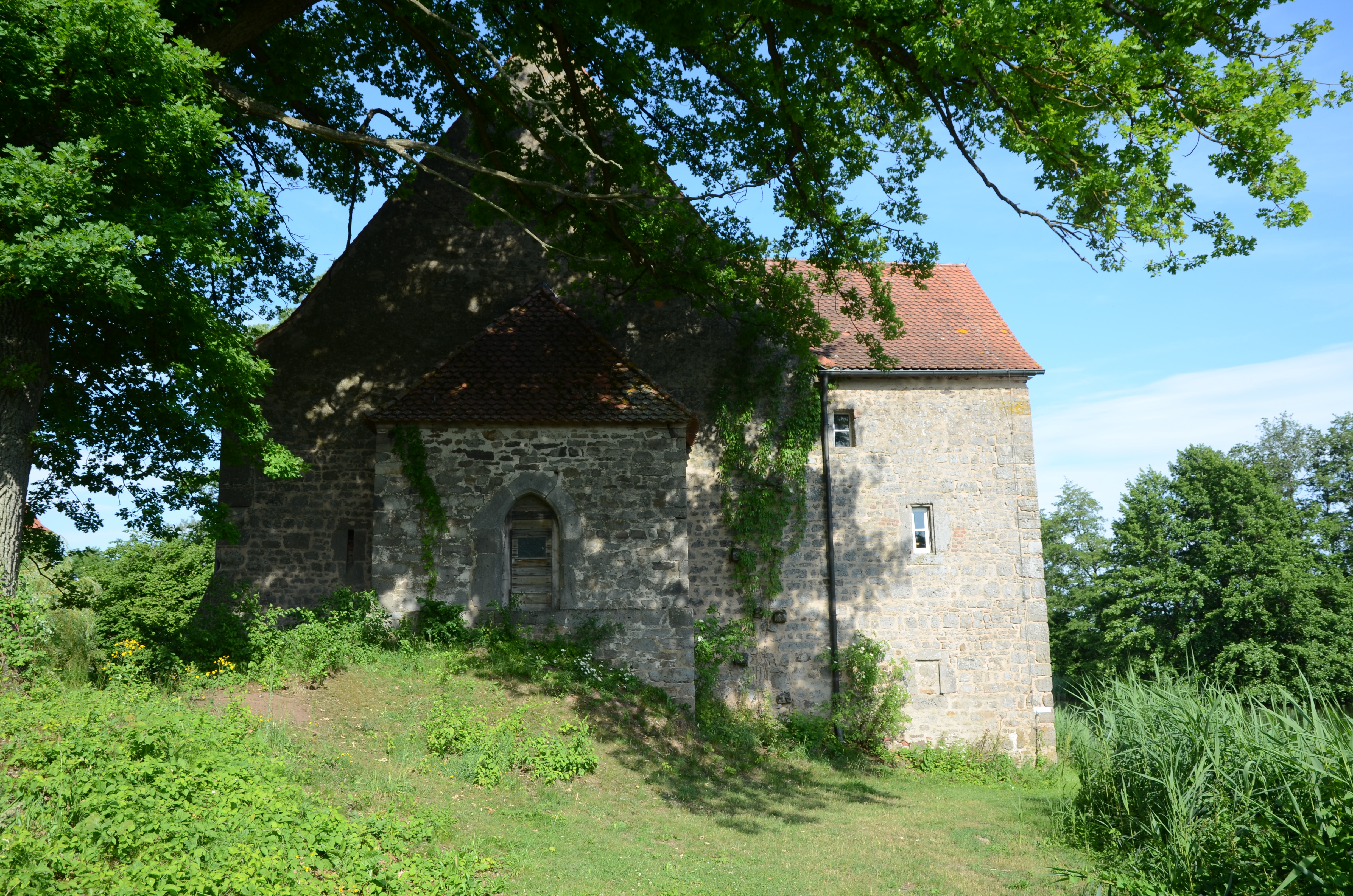 neue Schlosskirche in Sommersdorf , ehemals Zehnstadel